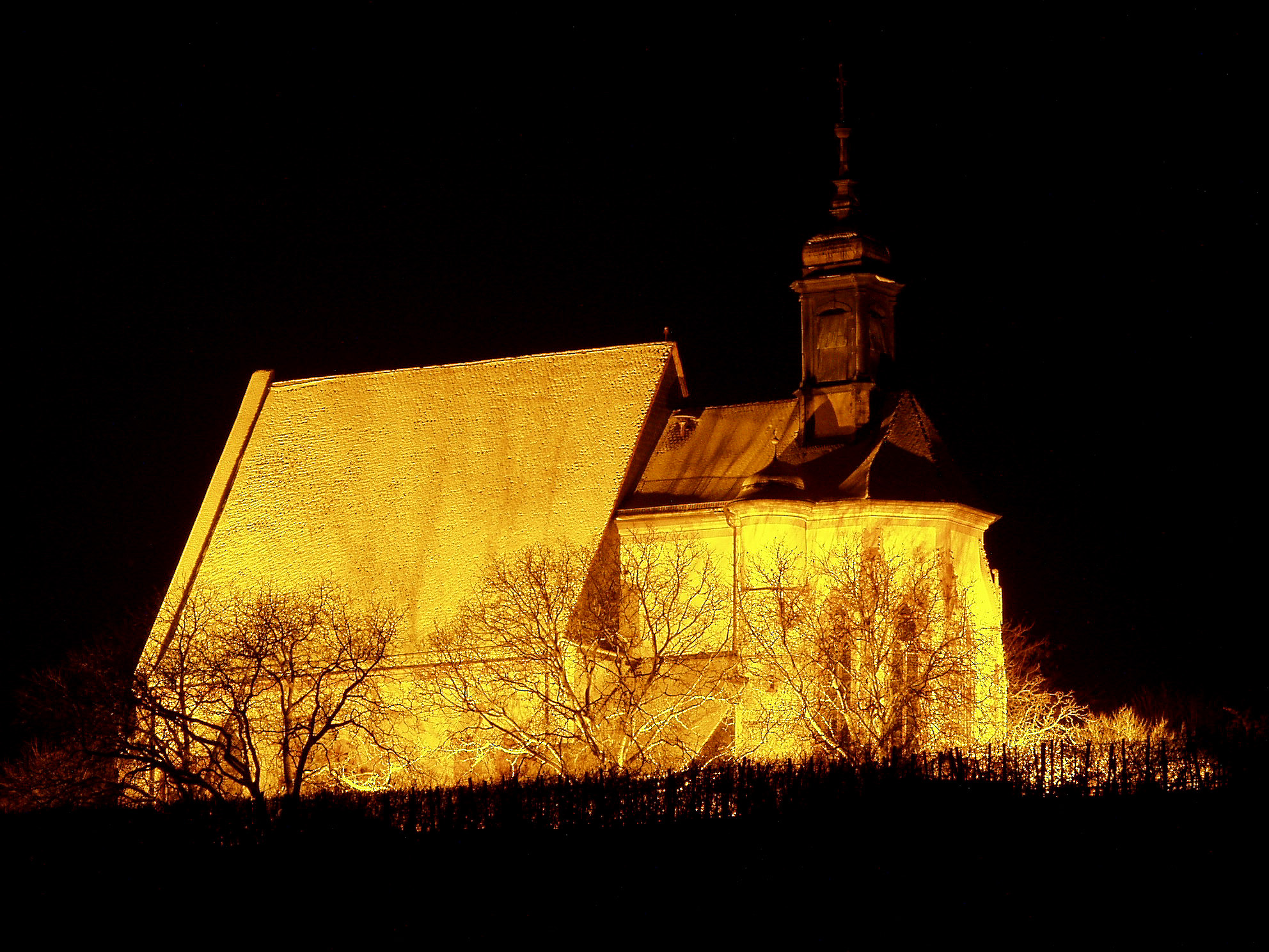 Die Weinbergskapelle 'Maria im Weingarten' im unterfränkischen Volkach